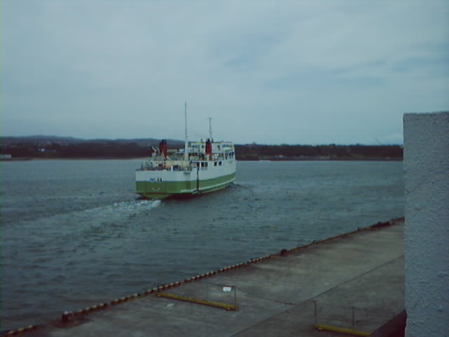 2001年1月建替えられる前の西之表港船乗り場屋上より九州商船フェリー出島の14時出港を臨む